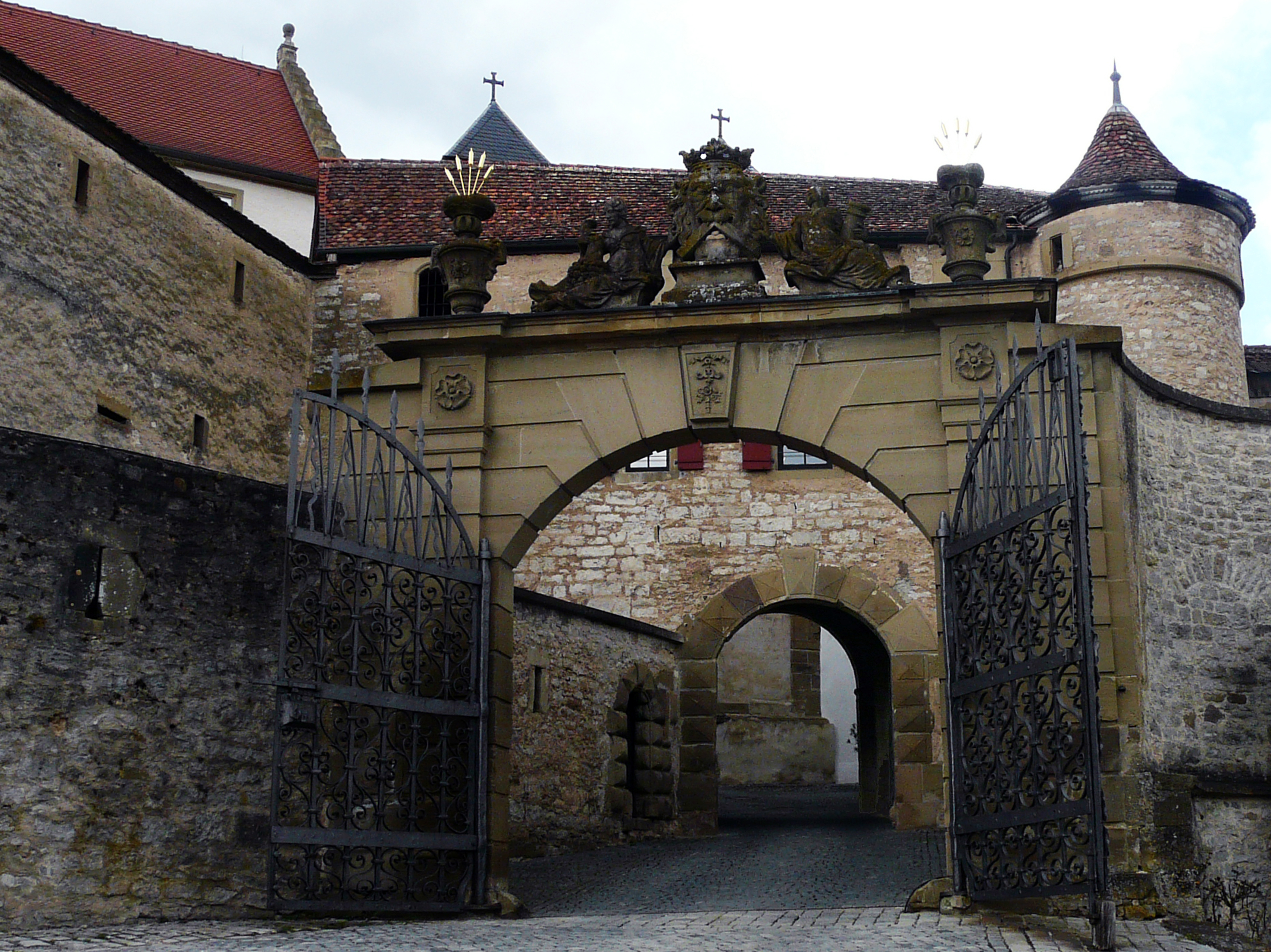 Ворота монастыря с гербом графов Комбург-Ротенбург: голова льва, держащего в зубах золотой шеврон.